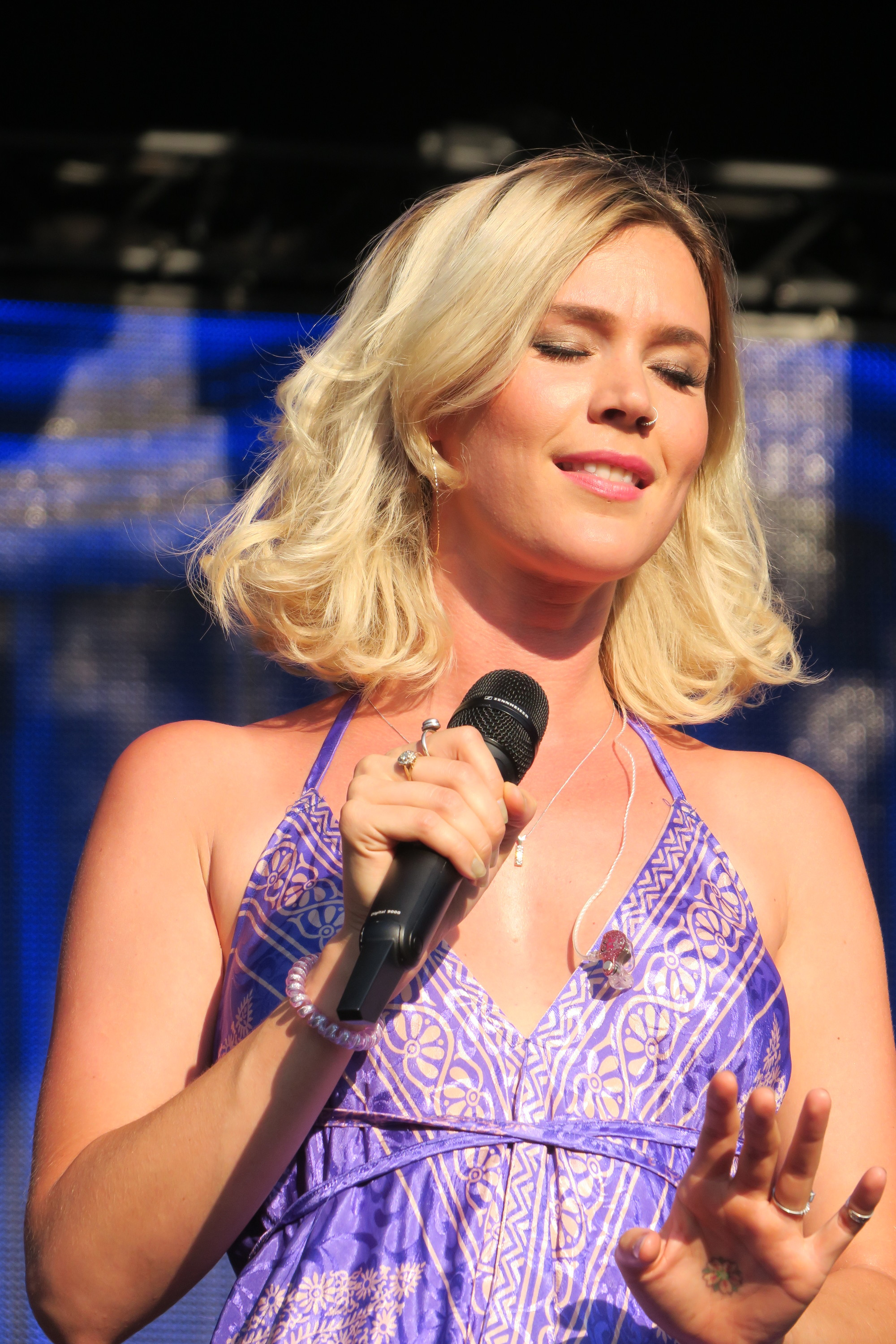 Joss Stone, 2018-07-19, jazzopen 2018, Schlossplatz Stuttgart